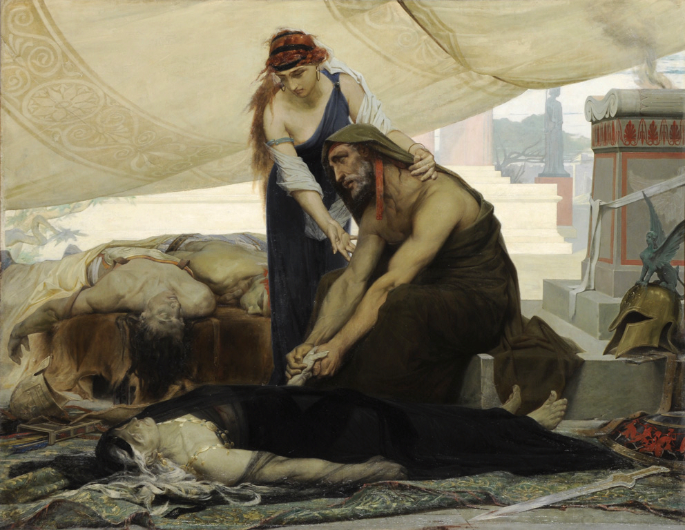 Edouard Toudouze, Les adieux d'Œdipe aux cadavres de sa femme et de ses fils, 1871, Paris, École Nationale Supérieure des Beaux-Arts